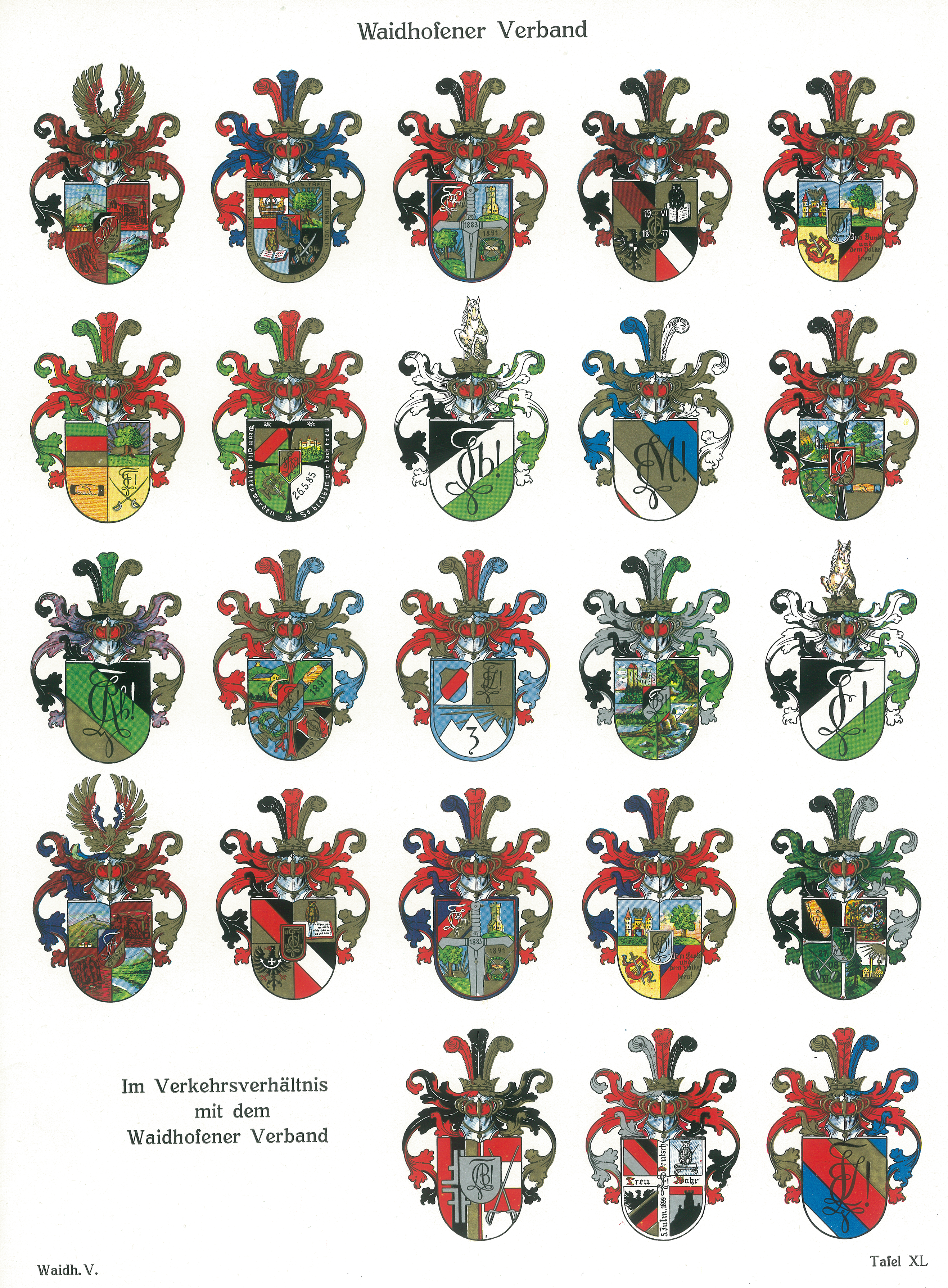 Studentenwappen des Waidhofener Verbandes.